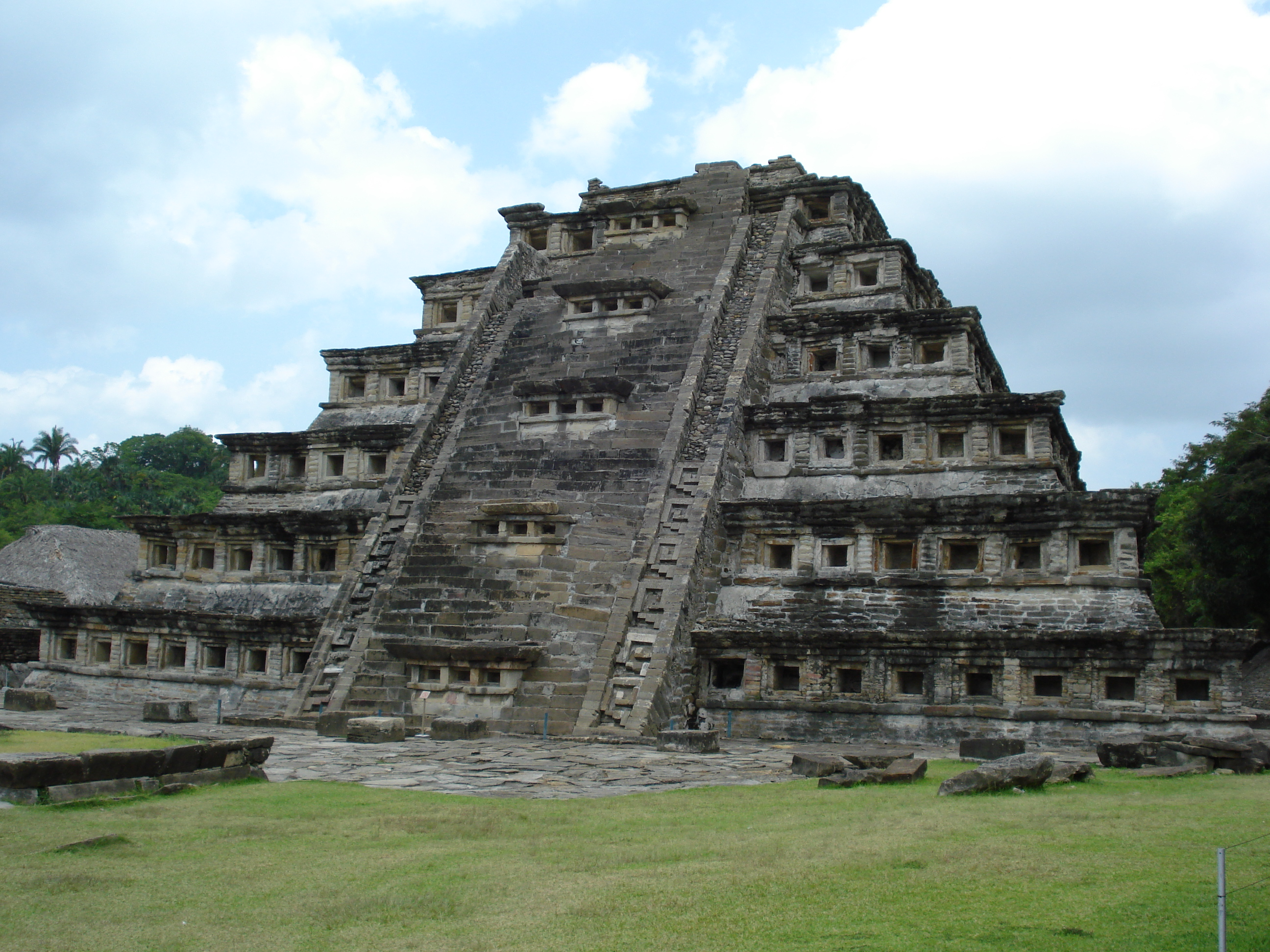 Tajin Piramide de los Nichos